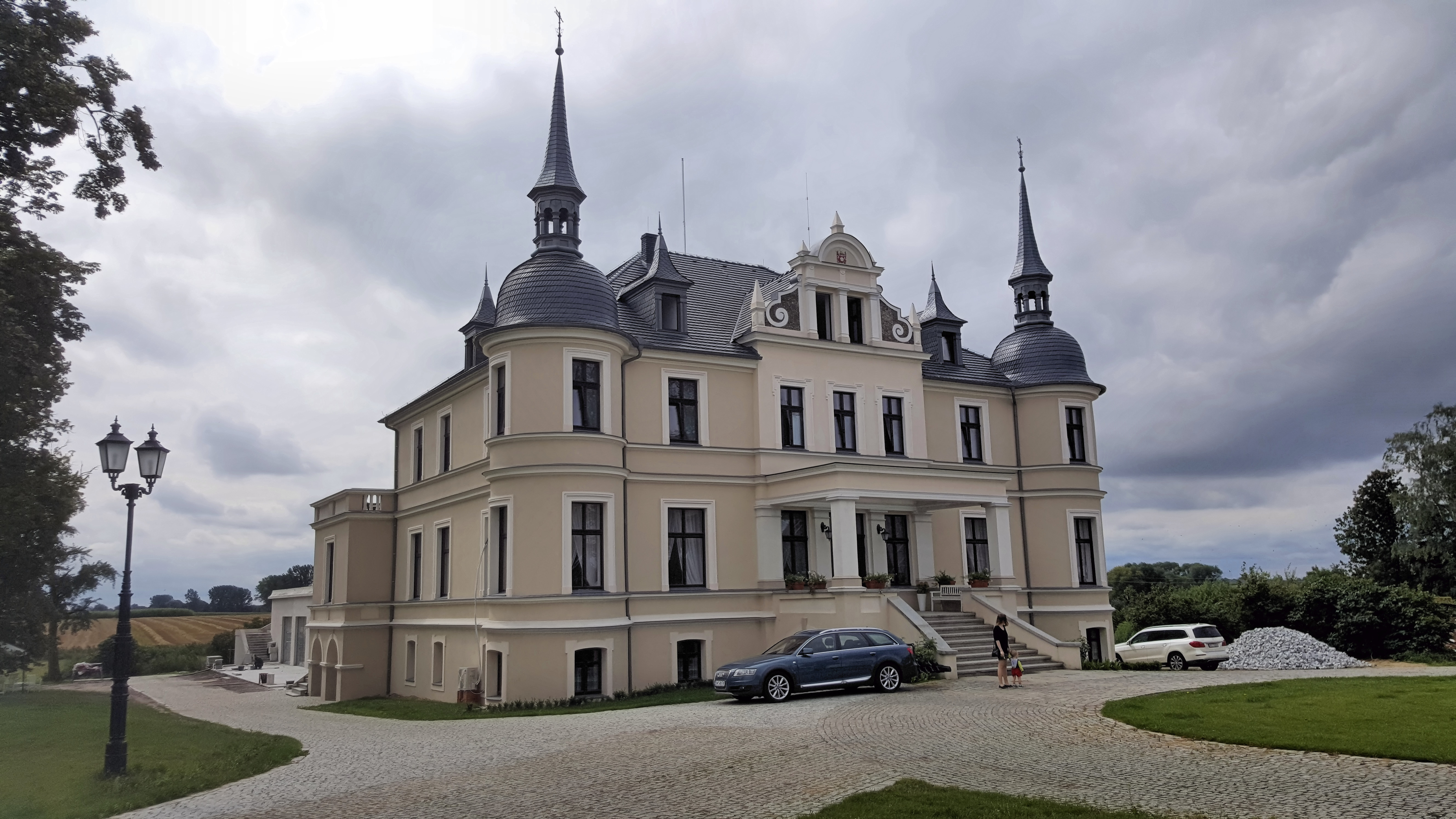 Wyremontowany pałac w Orli, w województwie wielkopolskim, w powiecie krotoszyńskim, w gminie Koźmin Wielkopolski. Profil na portalu Facebook